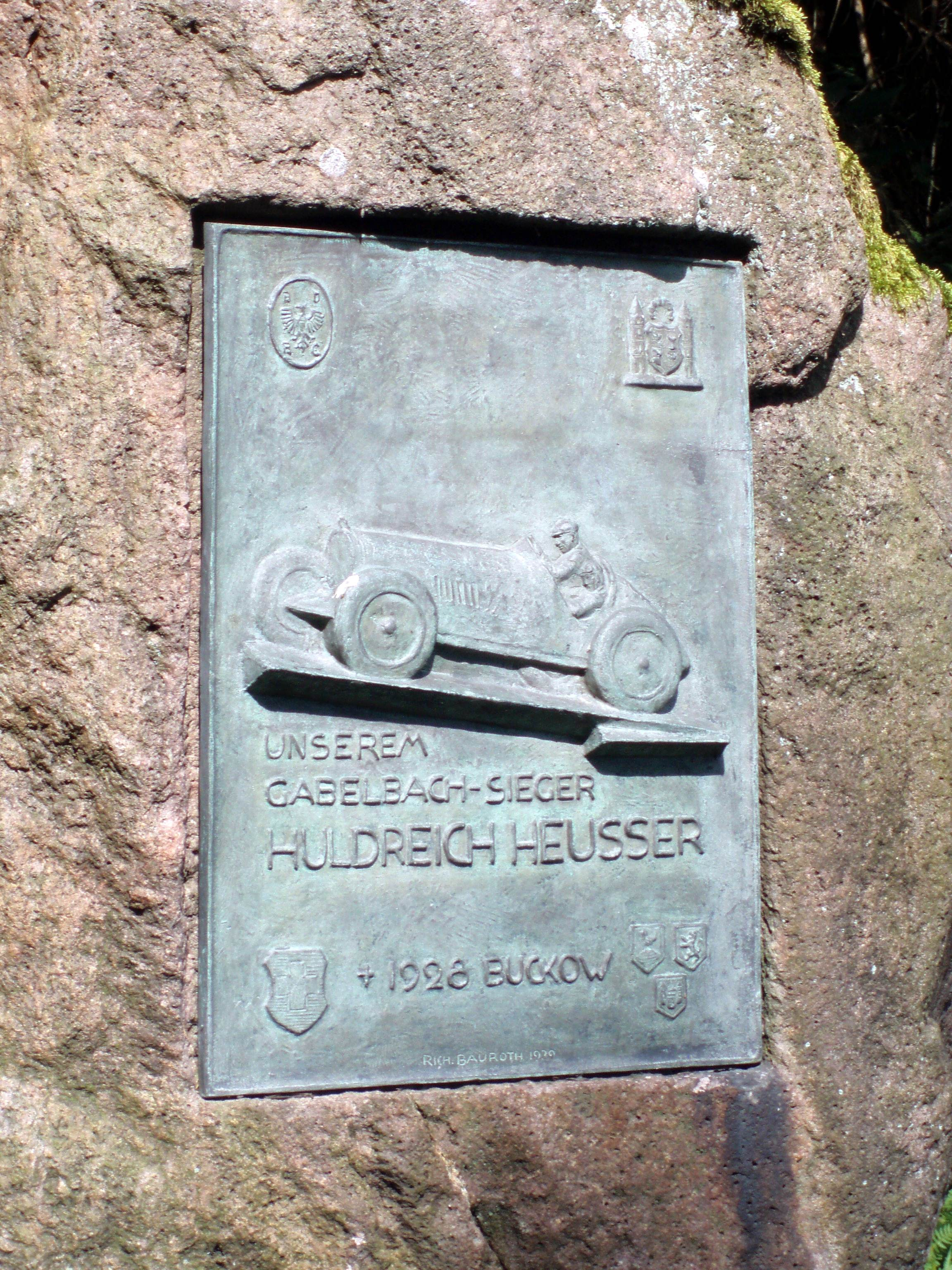 Heusser-Denkmal in Gabelbach